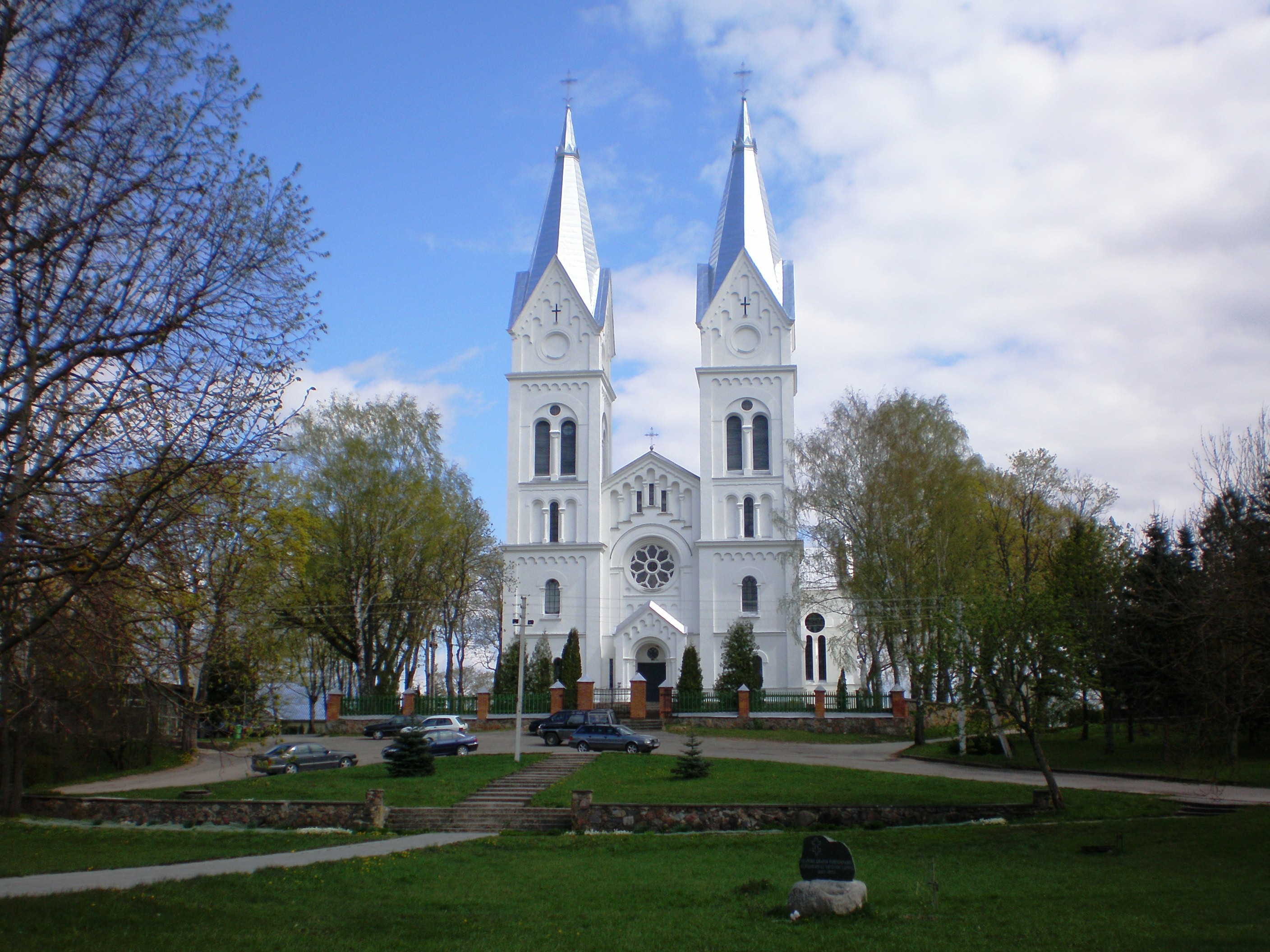 Alantos bažnyčia